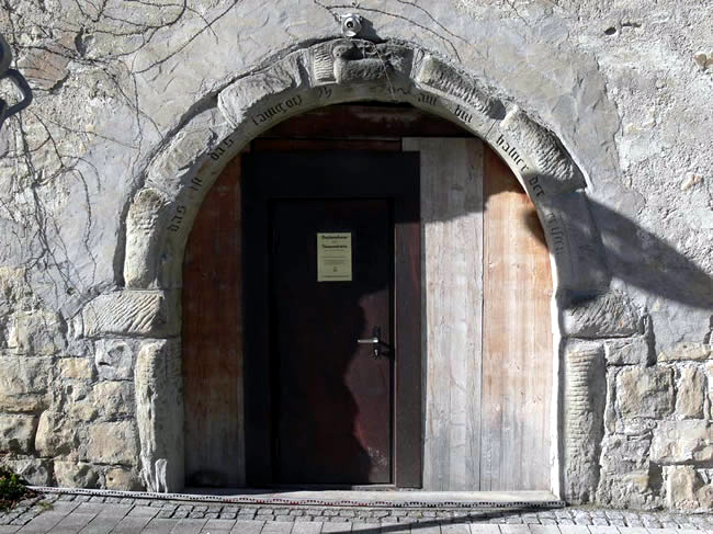 Sandsteintorborgen am Nonnenturm Kempten